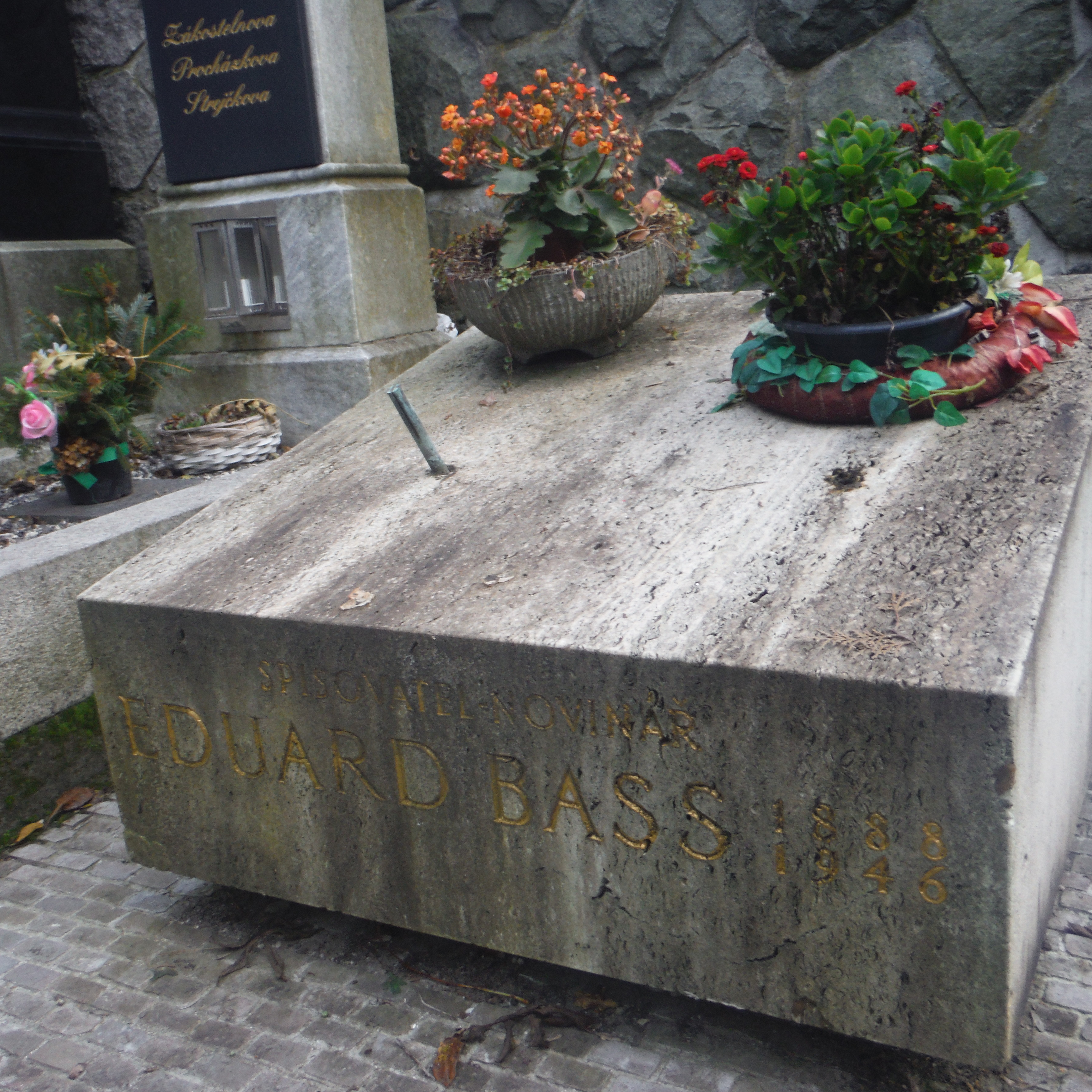 hrob